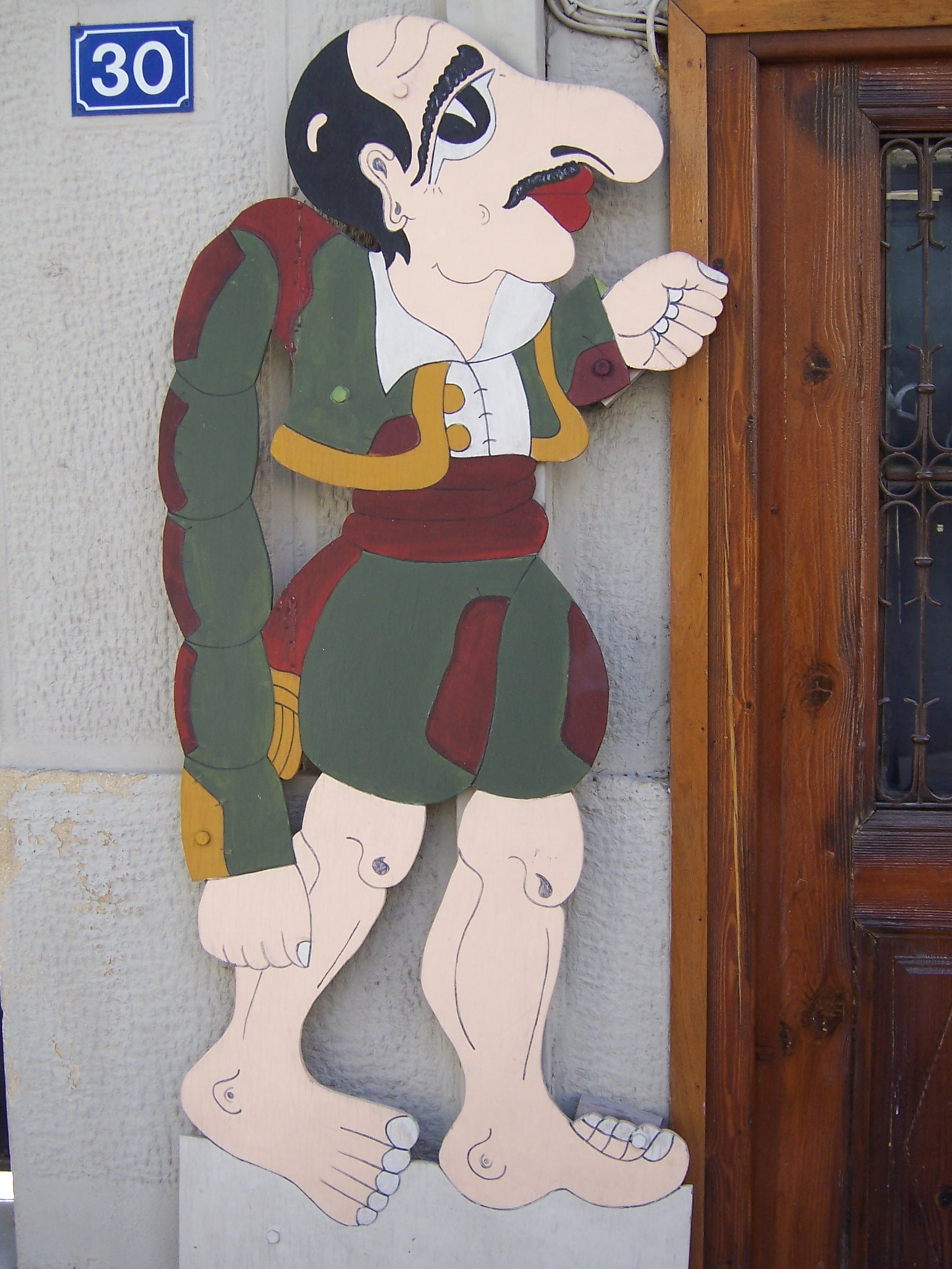 Karaghiozis. Athenes, Grèce